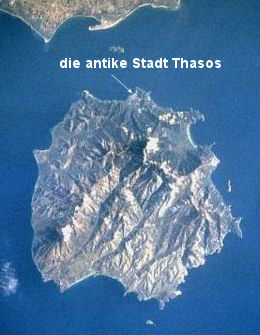 Satellitenbild der Griechischen Insel Thasos, Lage der antiken Stadt Thasos.